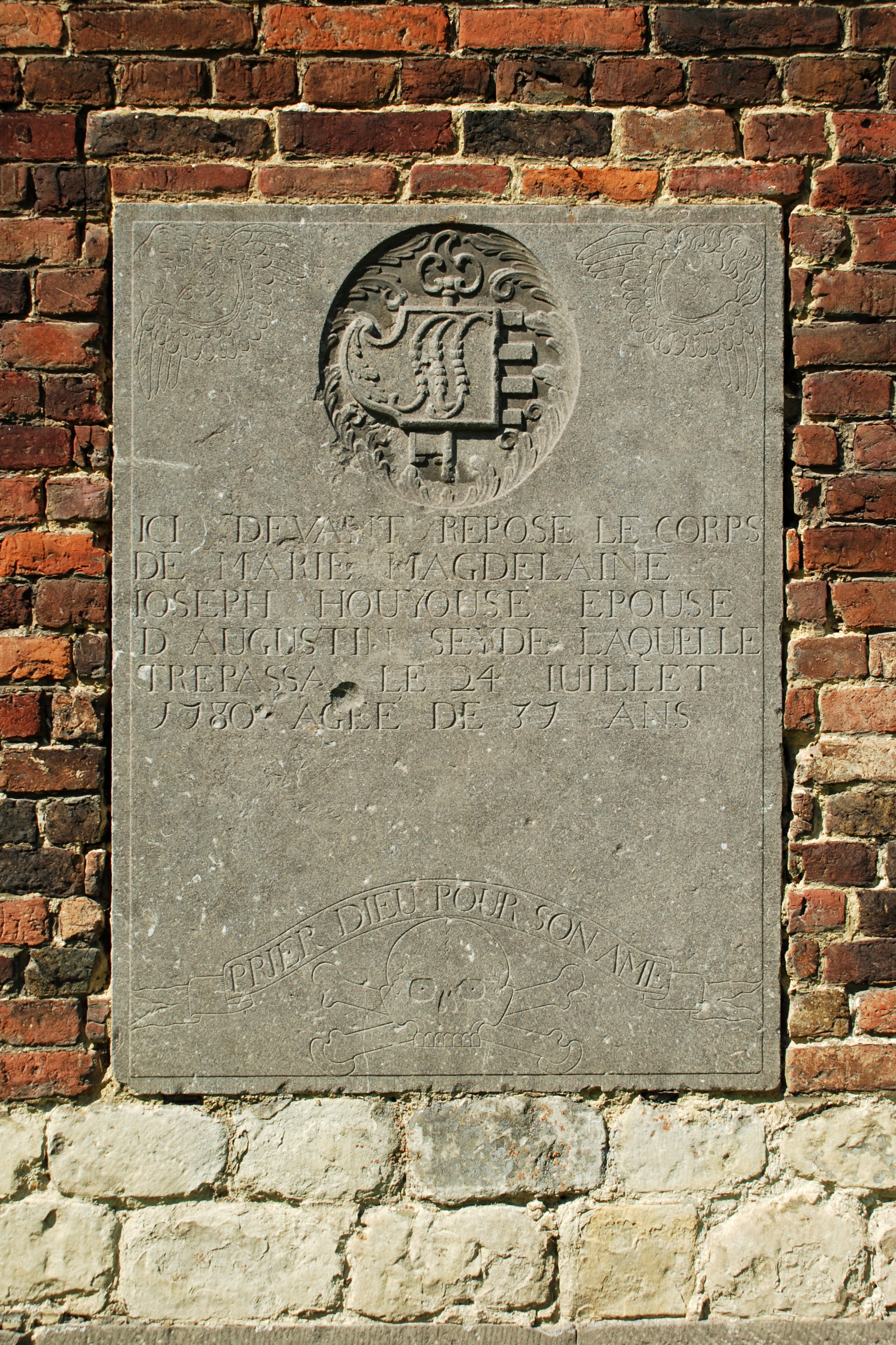 Belgique - Brabant wallon - Église Saint-Martin de Ways - Ancien cimetière paroissial